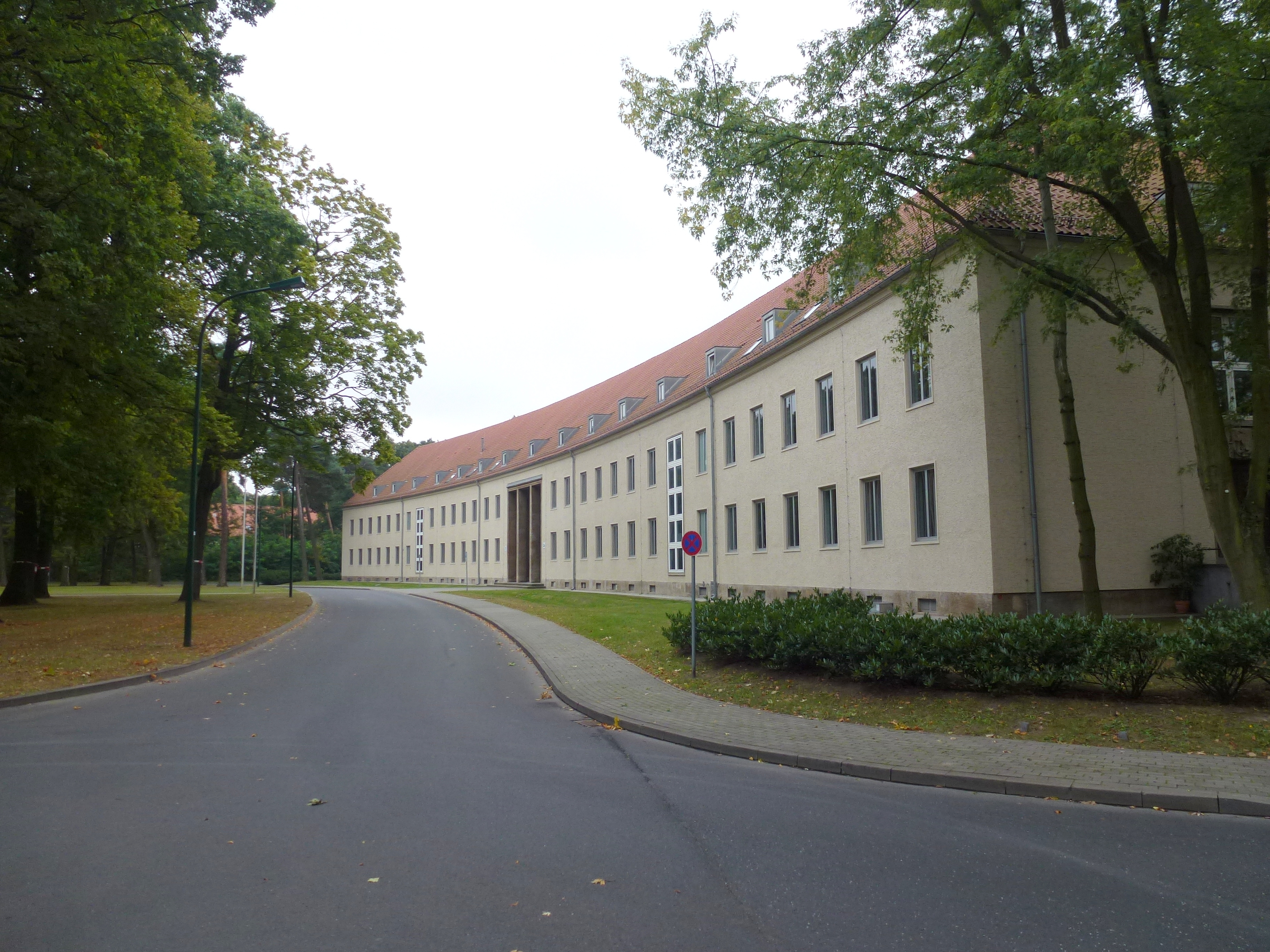 Julius-Leber-Kaserne Anhaltiner Weg